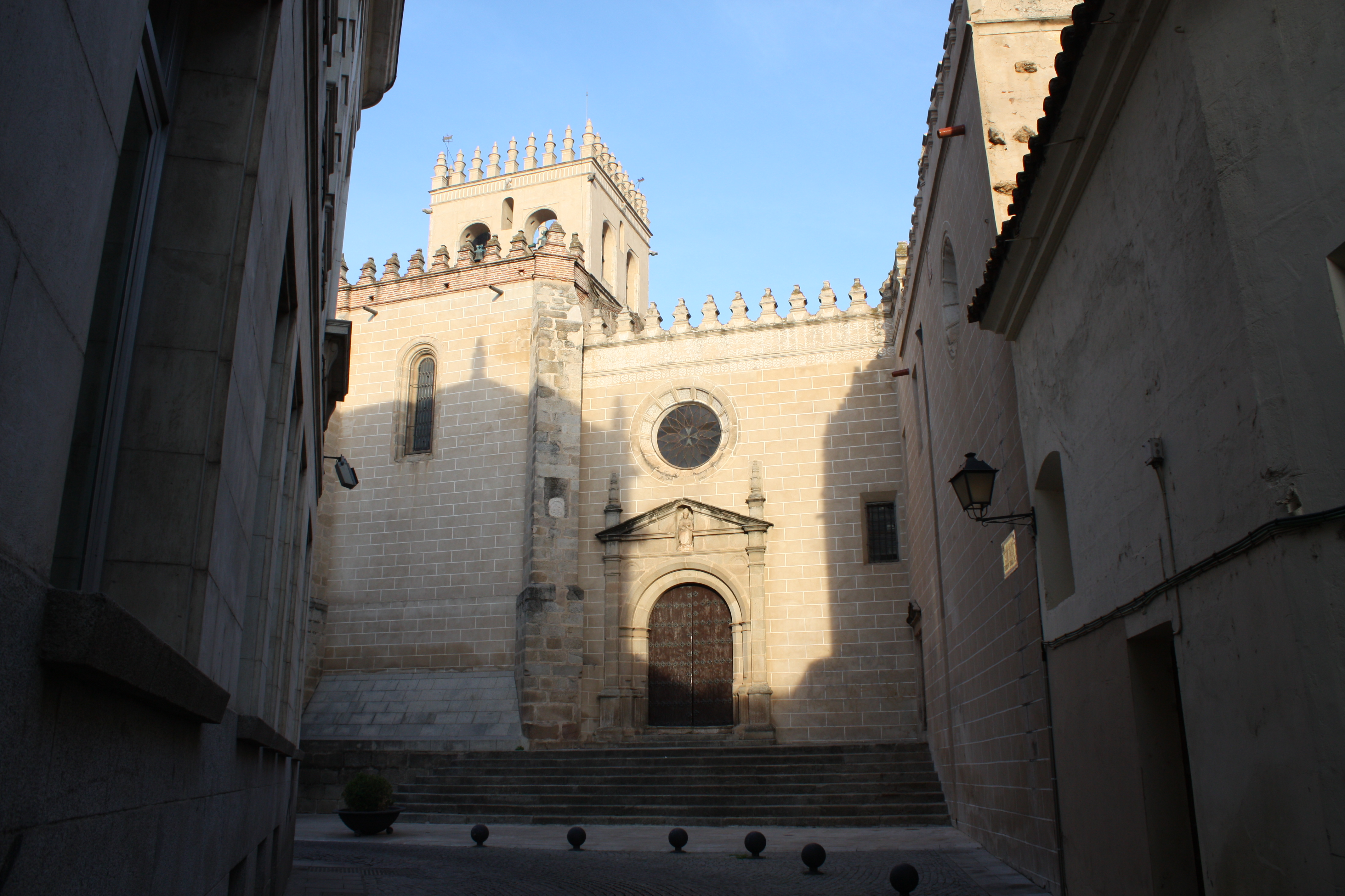 Museo de la Catedral Metropolitana, Badajoz (ES)